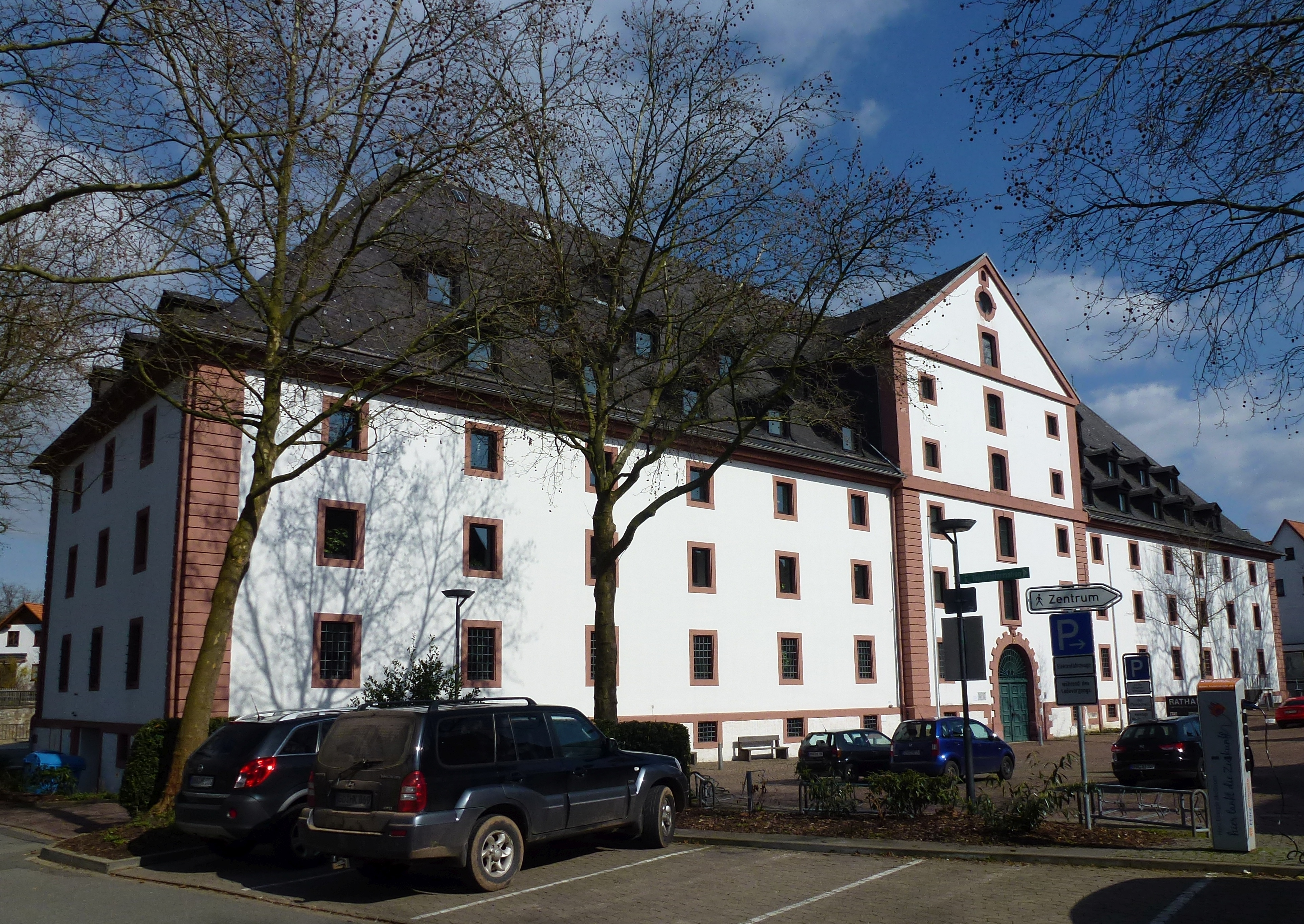 Harzkornmagazin Rückseite in Osterode am Harz, seit 1989 als Rathaus der Stadt genutzt.